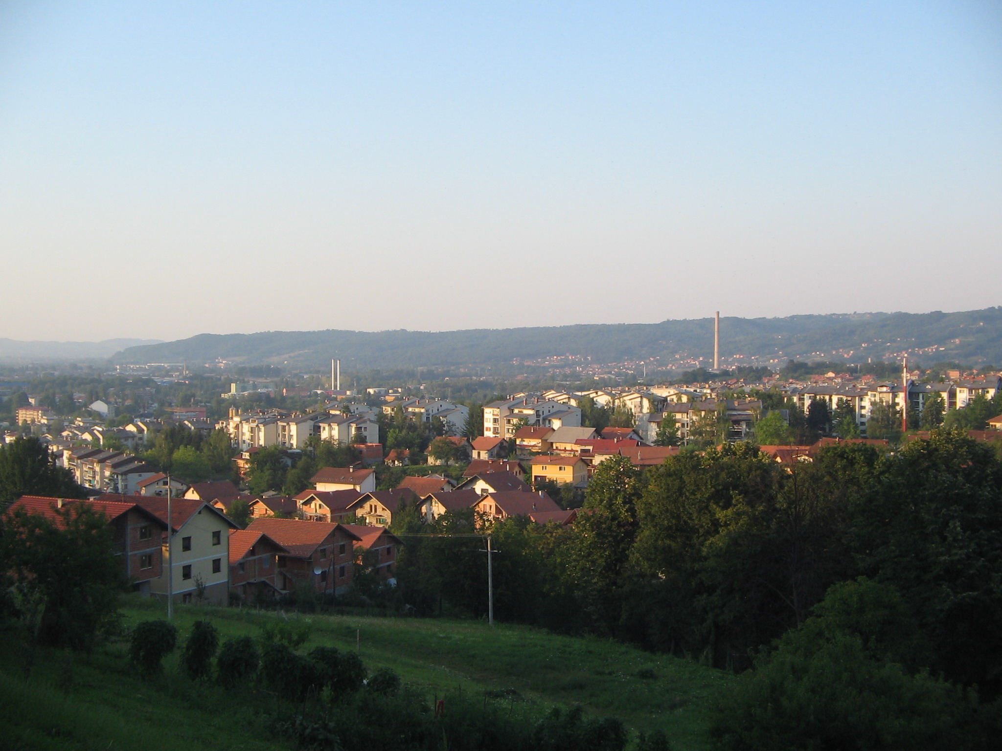 Starčevica